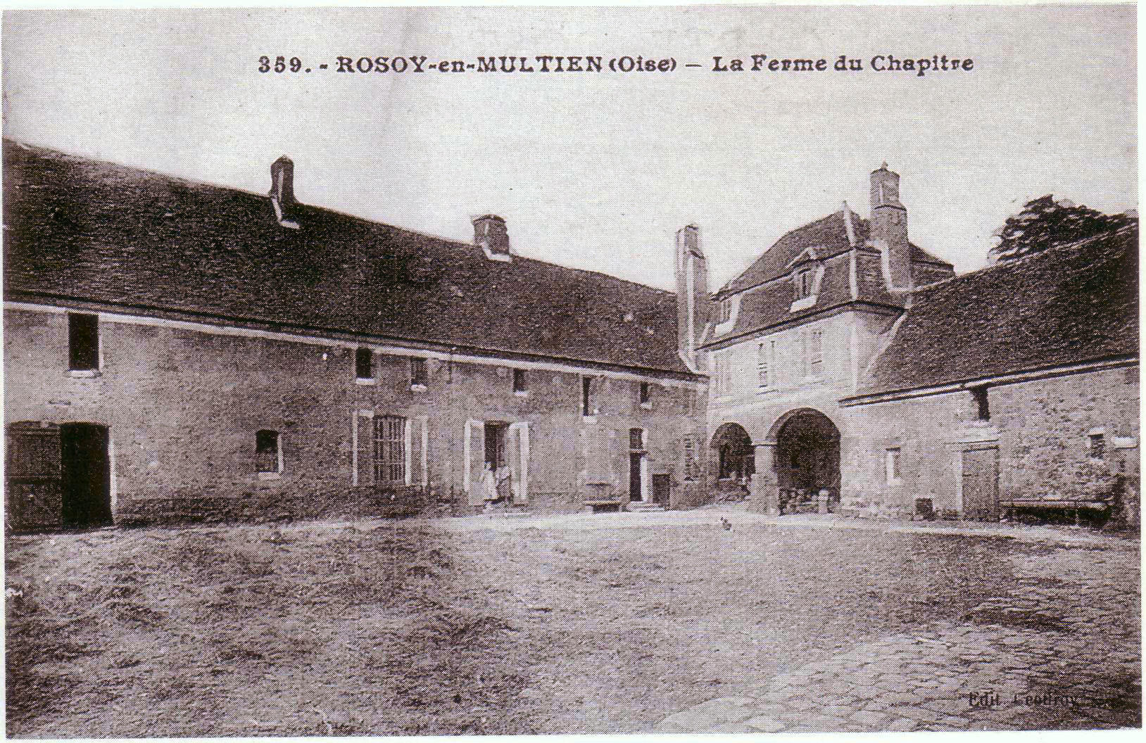 XVIe siècle, cour intérieure